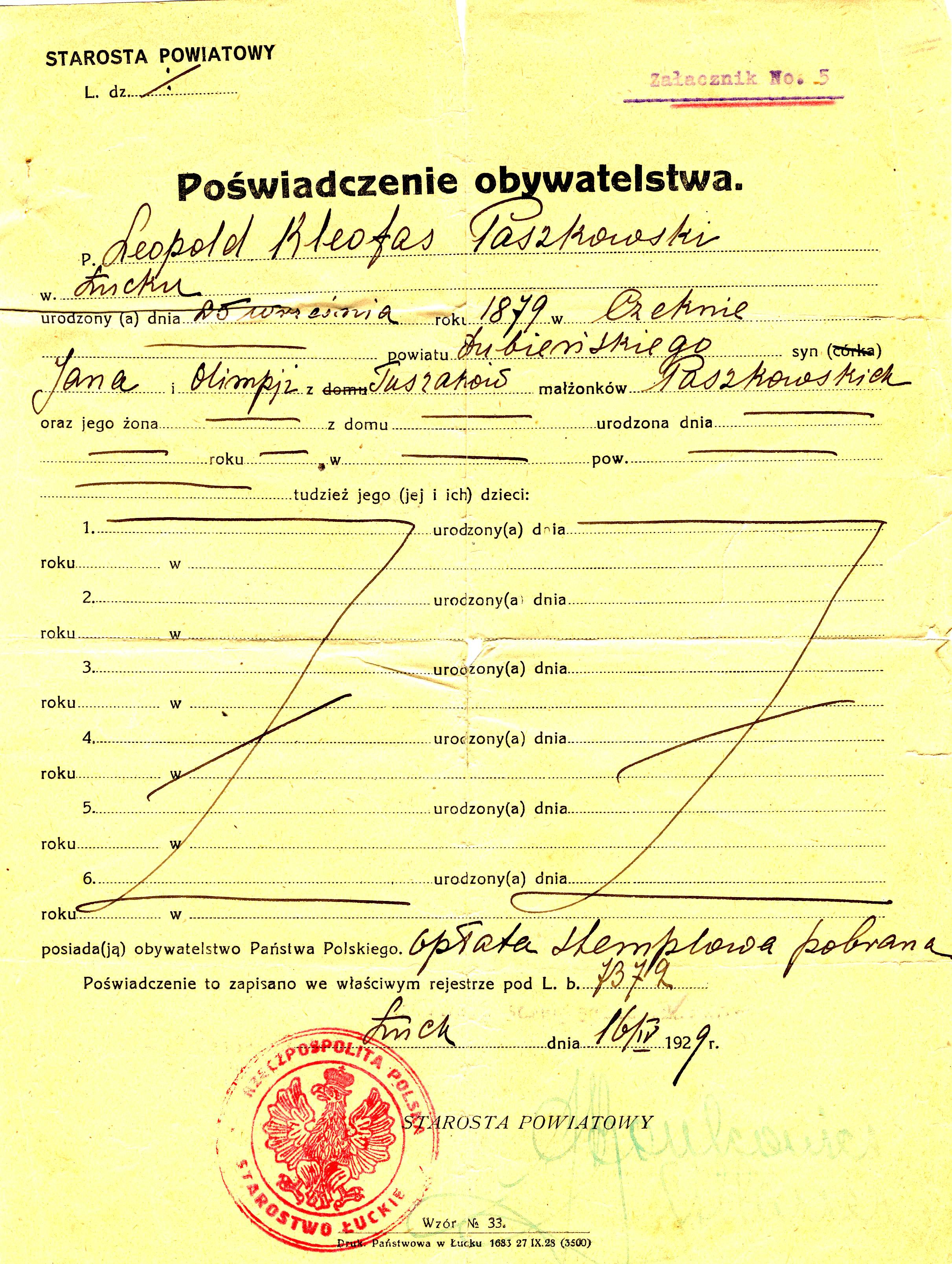 Poświadczenie obywatelstwa polskiego dla kandydata na mierniczego przysięgłego. Zenon Paszkowski, Polacy z Kresów Wschodnich na Warmii i Mazurach - Leopold Kleofas Paszkowski